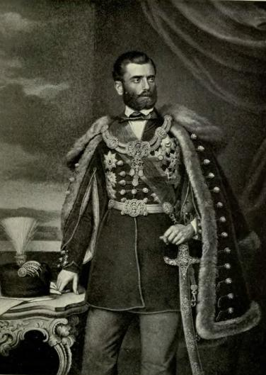 Miguel de Serbia.